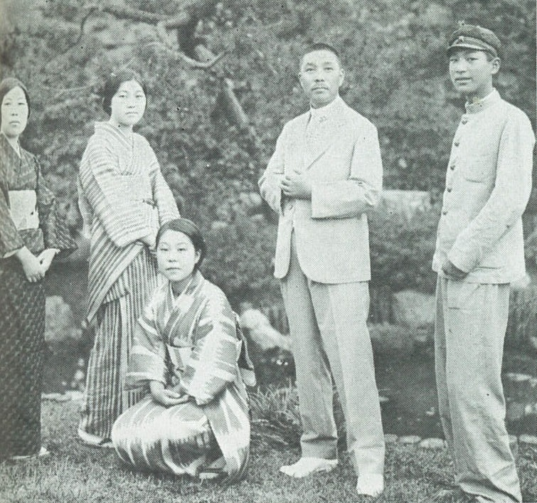 昭和6年撮影。函館市の郁雨荘庭前において。右より宮崎捷郎（郁雨の長男）、宮崎郁雨、貞子（郁雨の次女）、孝子（郁雨の長女）、ふき子